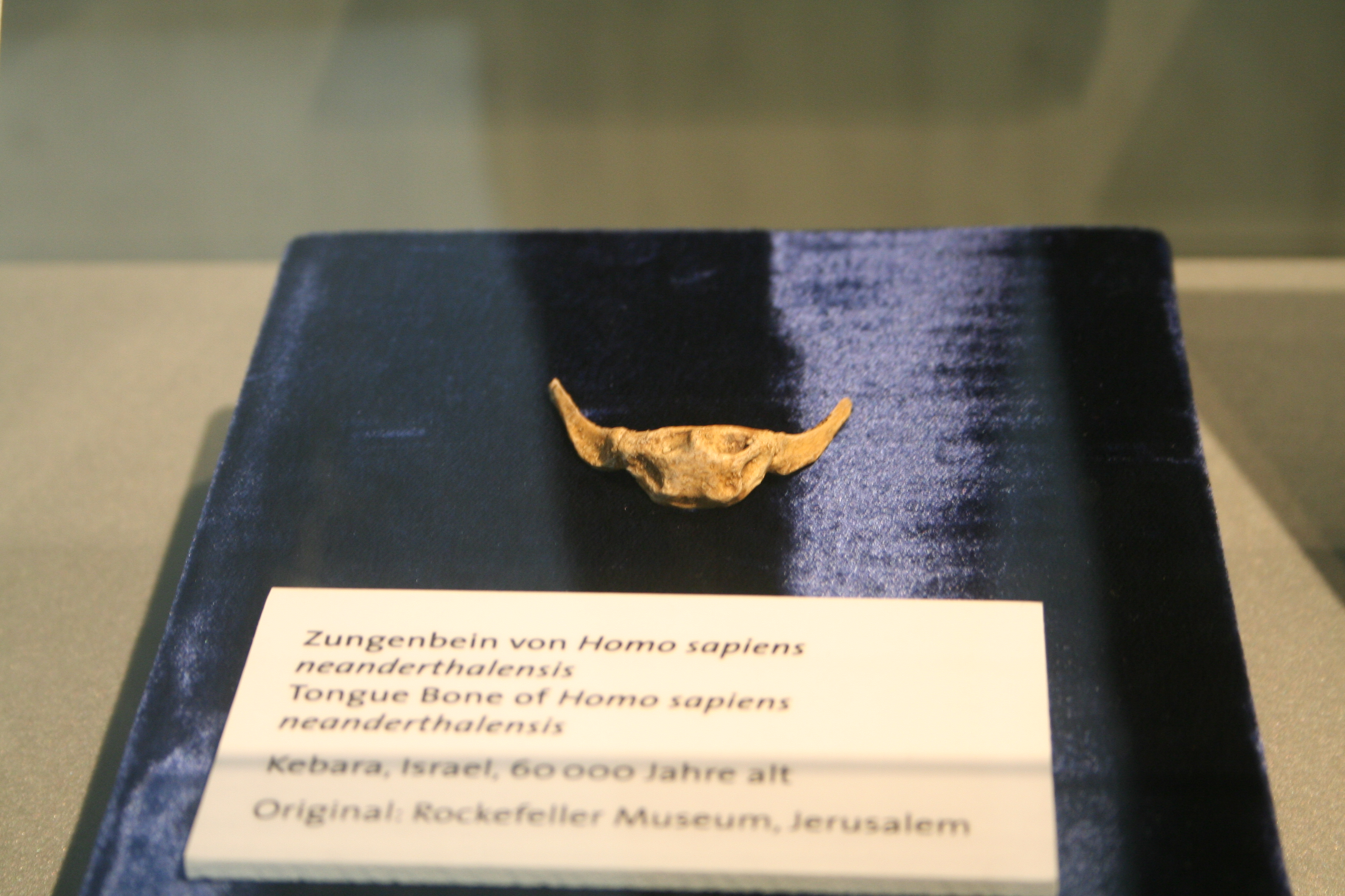 Neanderthal Museum, Mettmann